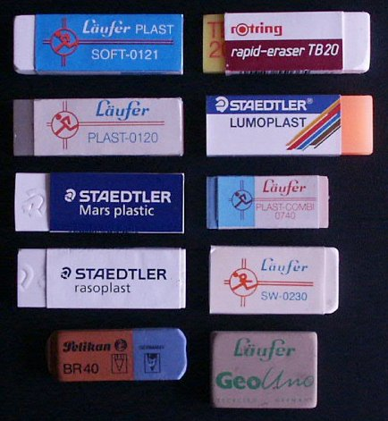 Quelle: selbst fotografiert, 11/2004 Fotograf: Späth Chr. Lizenzstatus